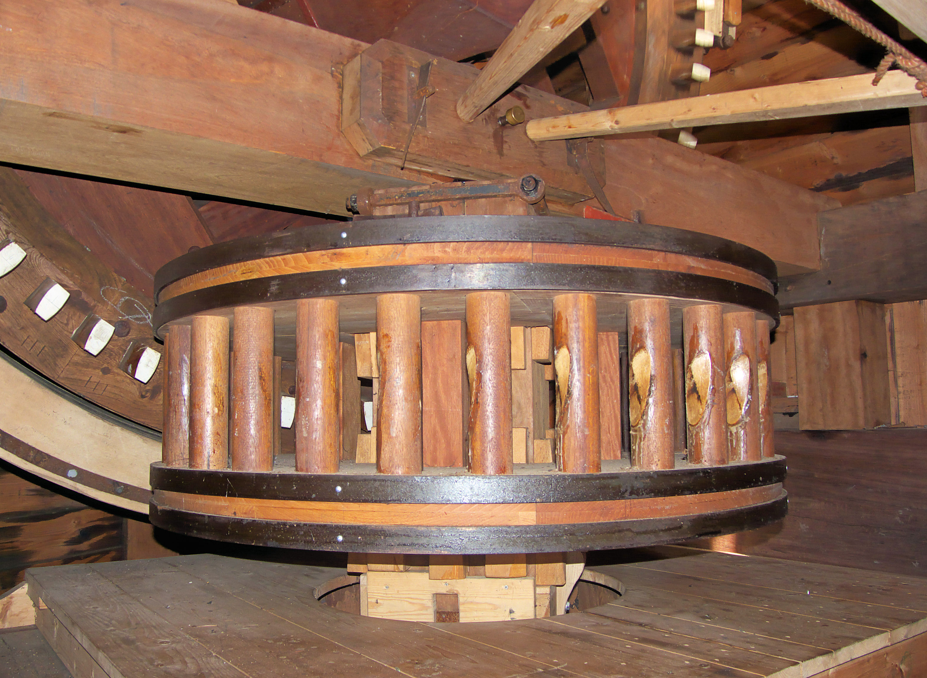 Noordeveldse molen, Dussen, Netherlands, bovenwiel met bovenschijfloop